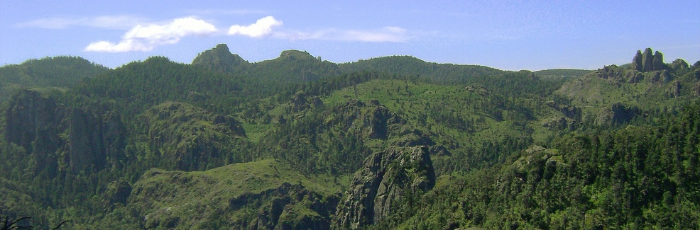 Panoramica de el Parque Nacional El Chico, México.